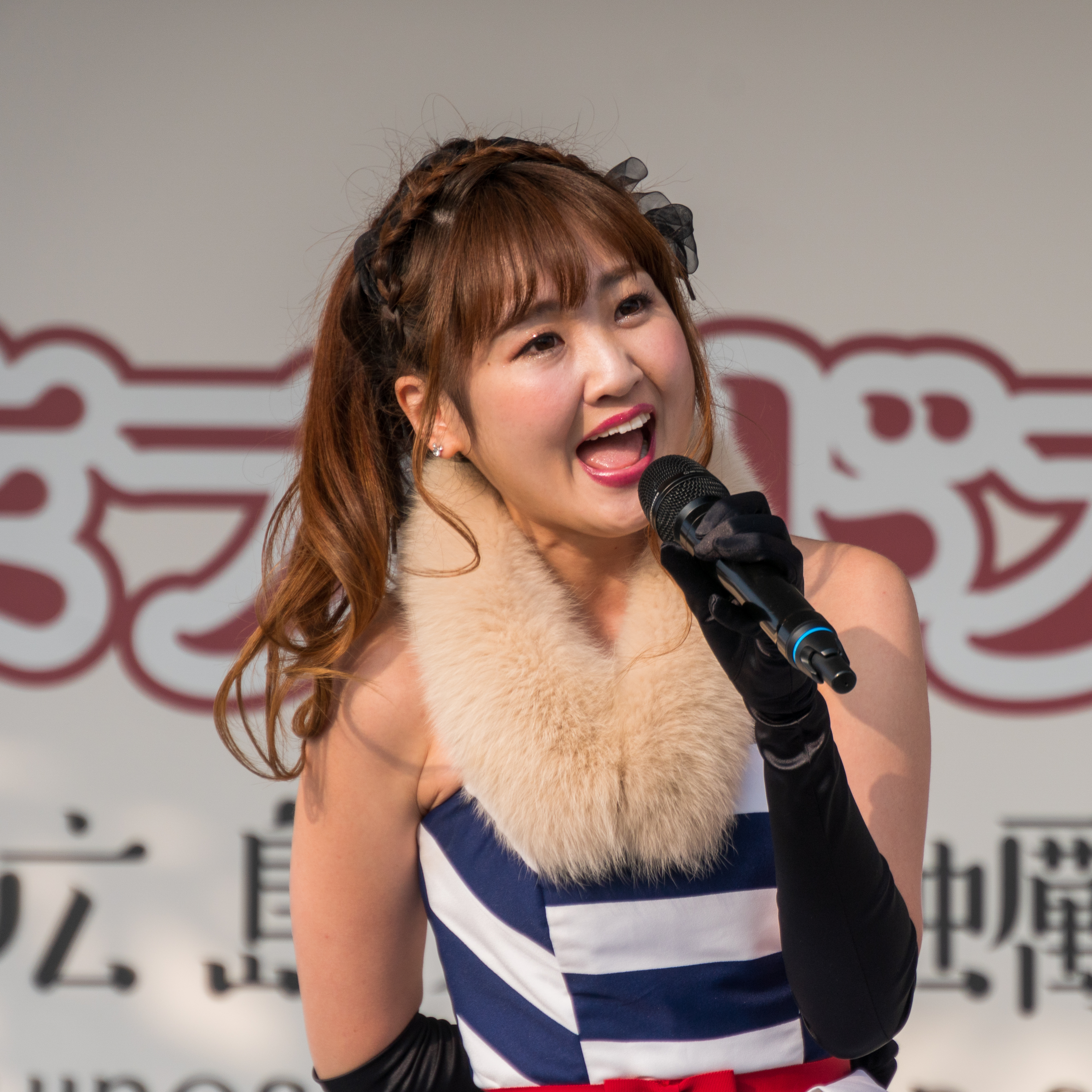 「ひろしまフードスタジアム 冬の陣」内の「DressingのNICE FANTASY!!」ステージにて撮影